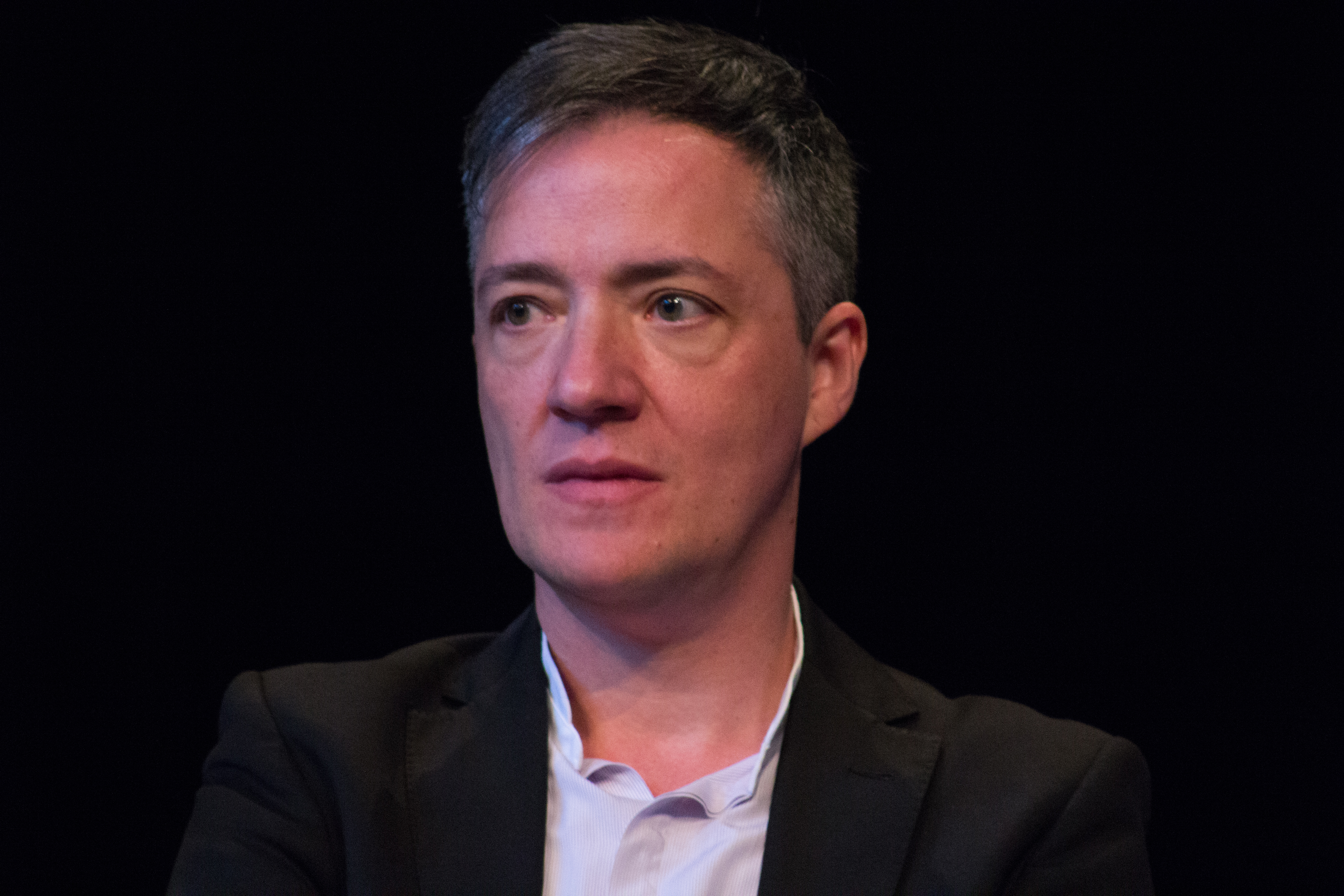 Documenta 14 in Kassel: Paul B. Preciado im Rahmen der Eröffnungskonferenz der Documenta 14 am 7. Juni 2017 in Kassel